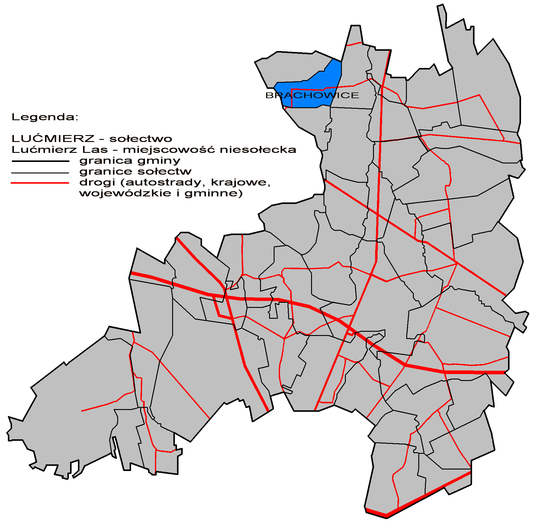 Położenie sołectwa Brachowice na mapie gminy Zgierz